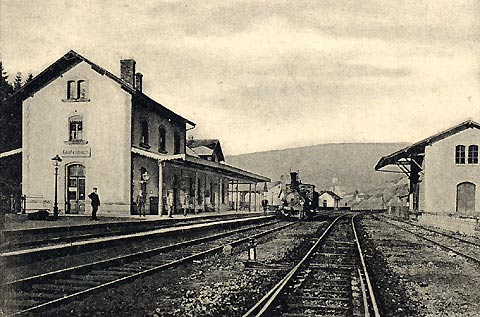 Gare Kautenbaach